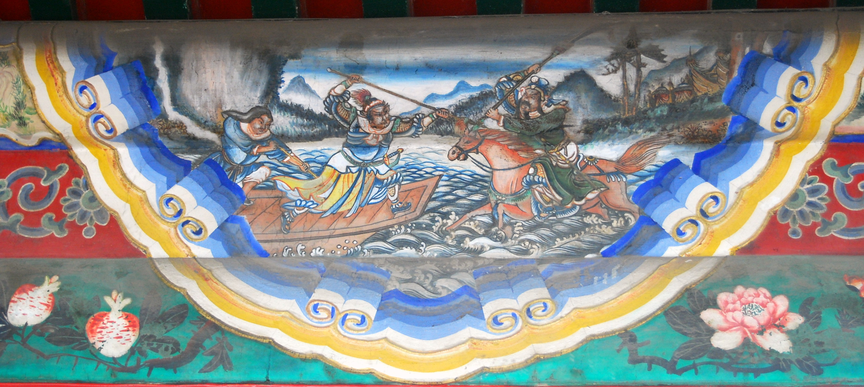 Quan Vũ dùng kế dâng nước đánh bảy đạo quân - Di Hòa Viên